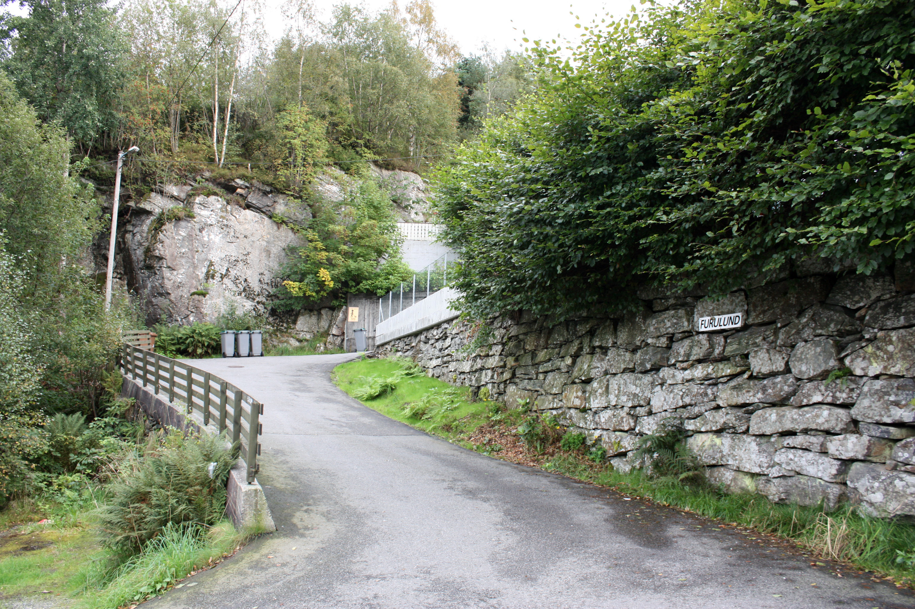 Furulund, Fana, Bergen.